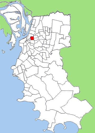 O bairro Moinhos de Vento (em verde escuro), da cidade brasileira de Porto Alegre